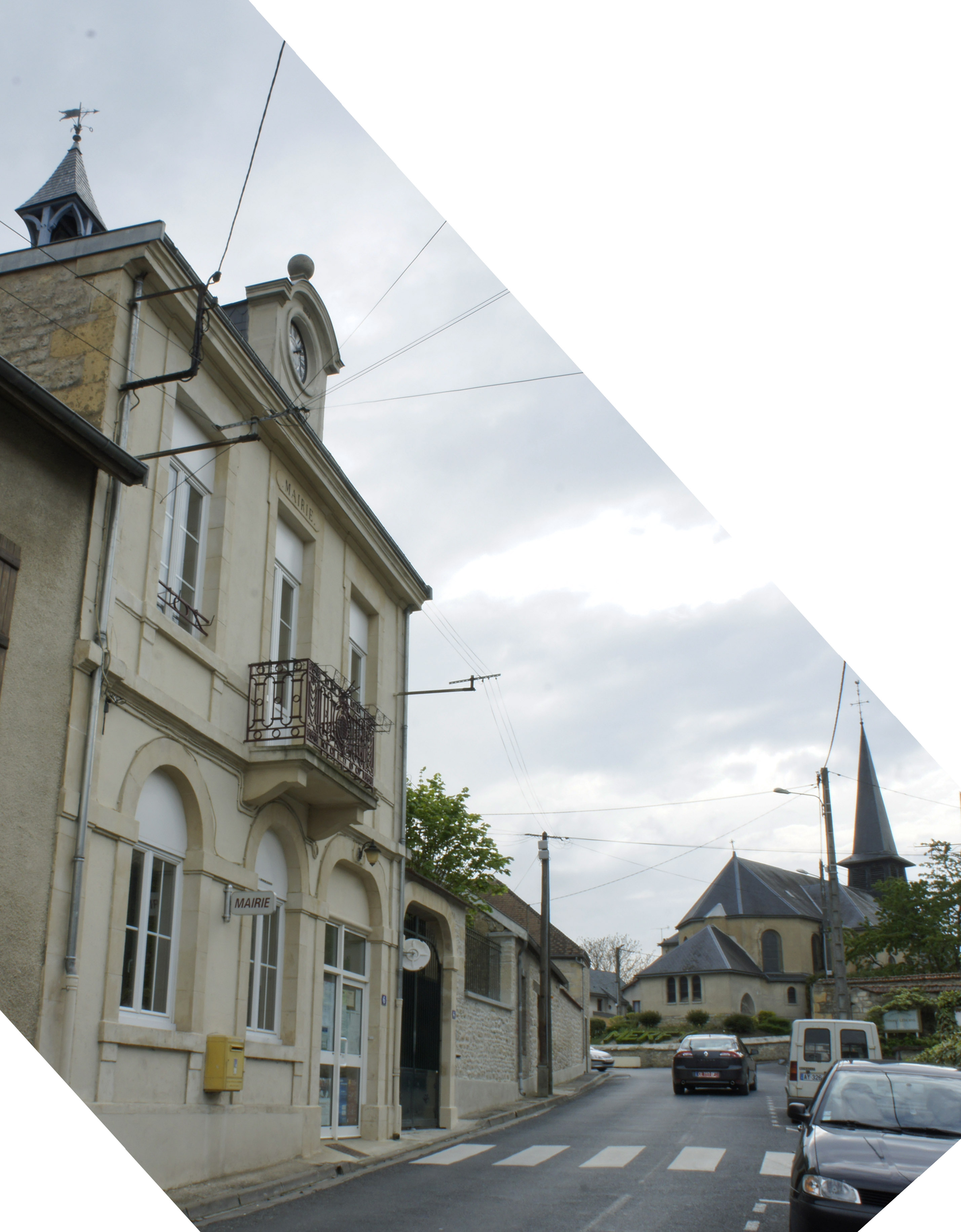 Vue de la Mairie de Merfy.